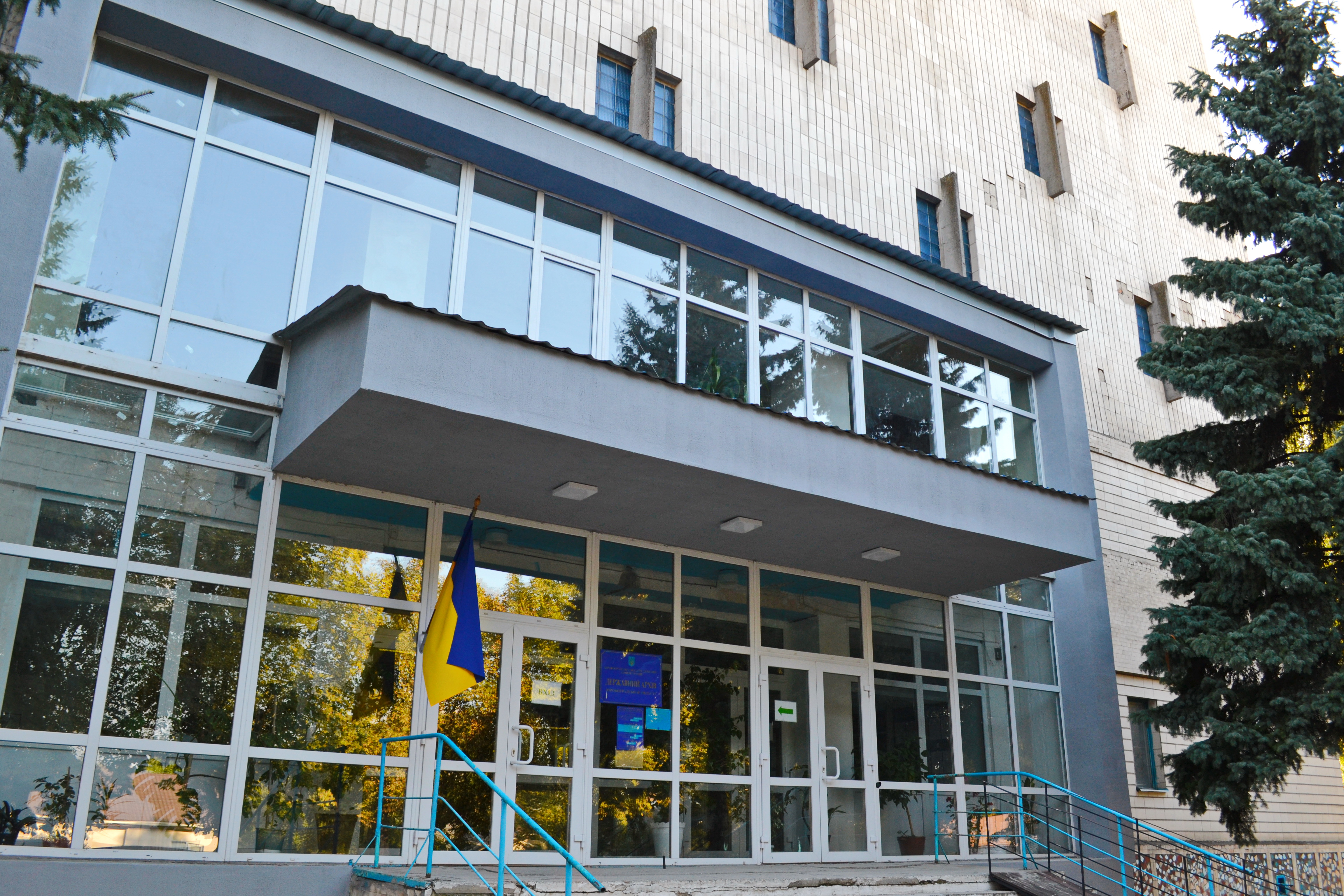 Державний архів Кіровоградської області, корпус №1.